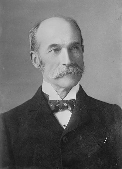 Fonte: Biblioteca del Congresso degli Stati Uniti. Descrizione: Foto di Henry Lansdowne, Ministro degli Esteri britannico dal 1900 al 1905. Note: Digital ID: ggbain 02830 Source: digital file from original neg. Reproduction Number: LC-DIG-ggbain-02830 (digital file from original neg.) Repository: Library of Congress Prints and Photographs Division Washington, D.C. 20540 USA